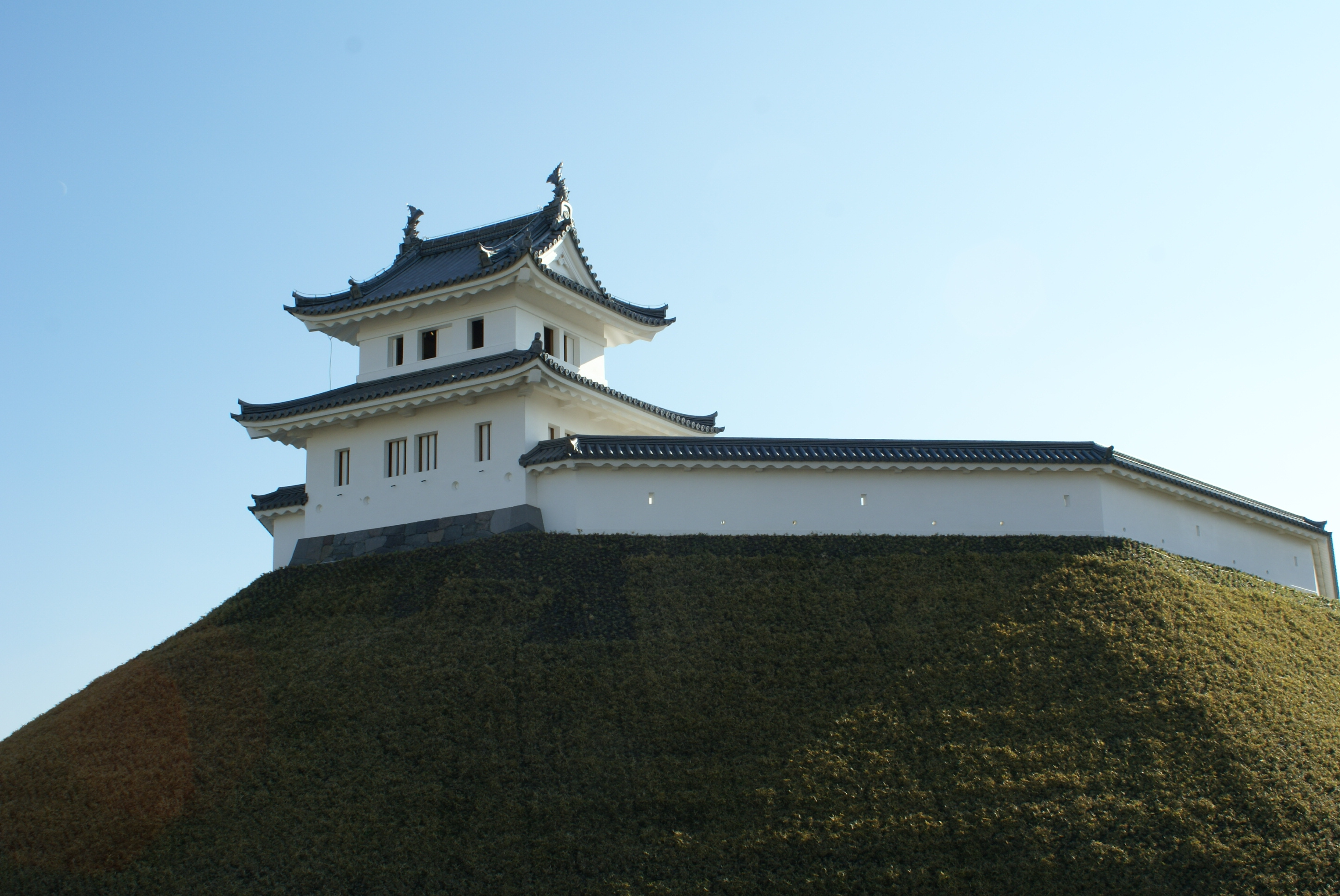 宇都宮城清明台櫓